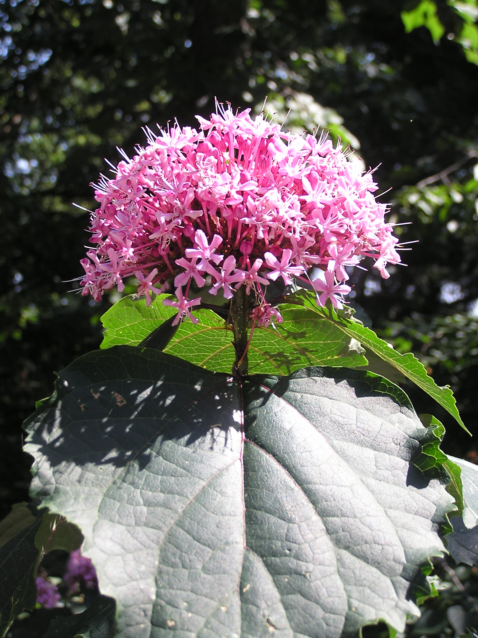 Никитский ботанический сад